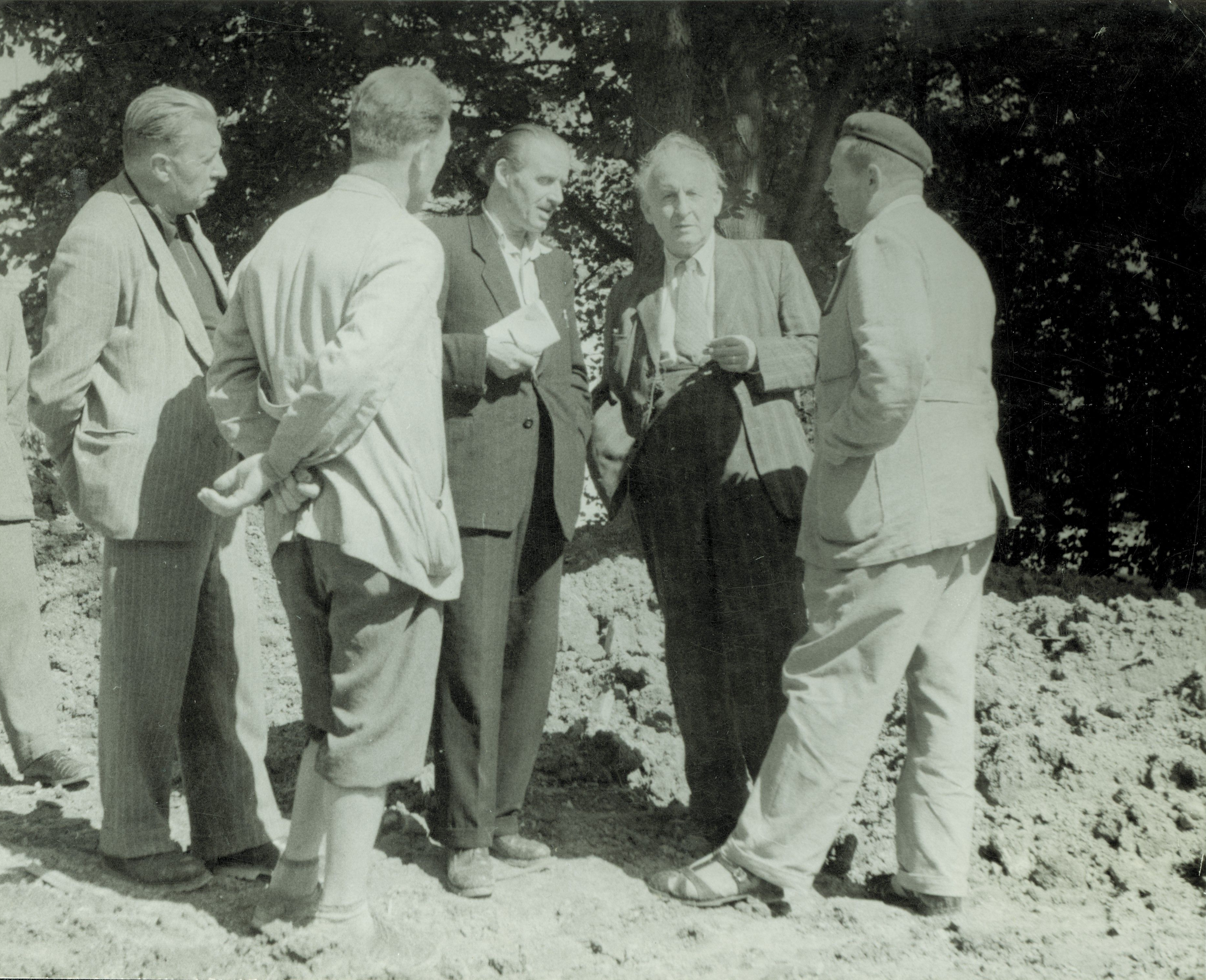 Arhitekt Gaspari daje zadnja navodila gradbenemu odboru.